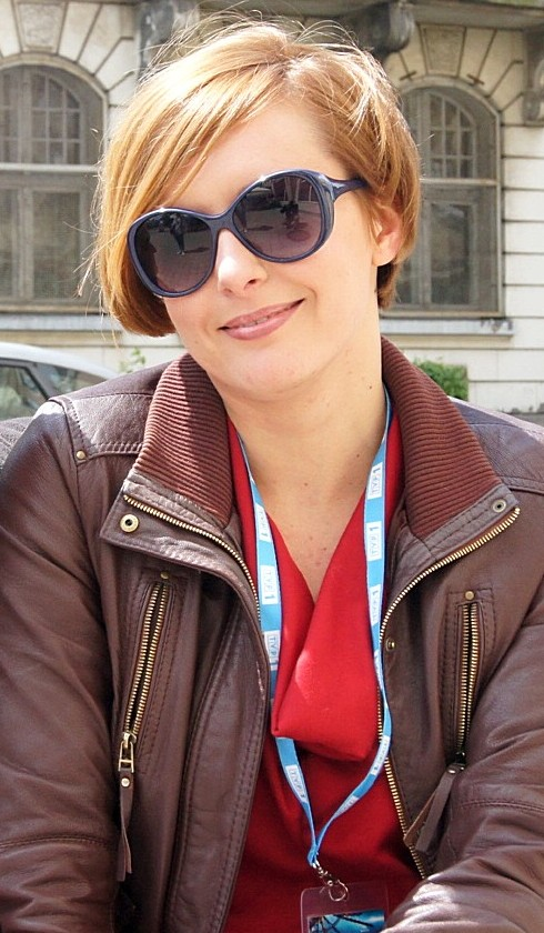 Monika Kuszyńska w Opolu, 2 czerwca 2012